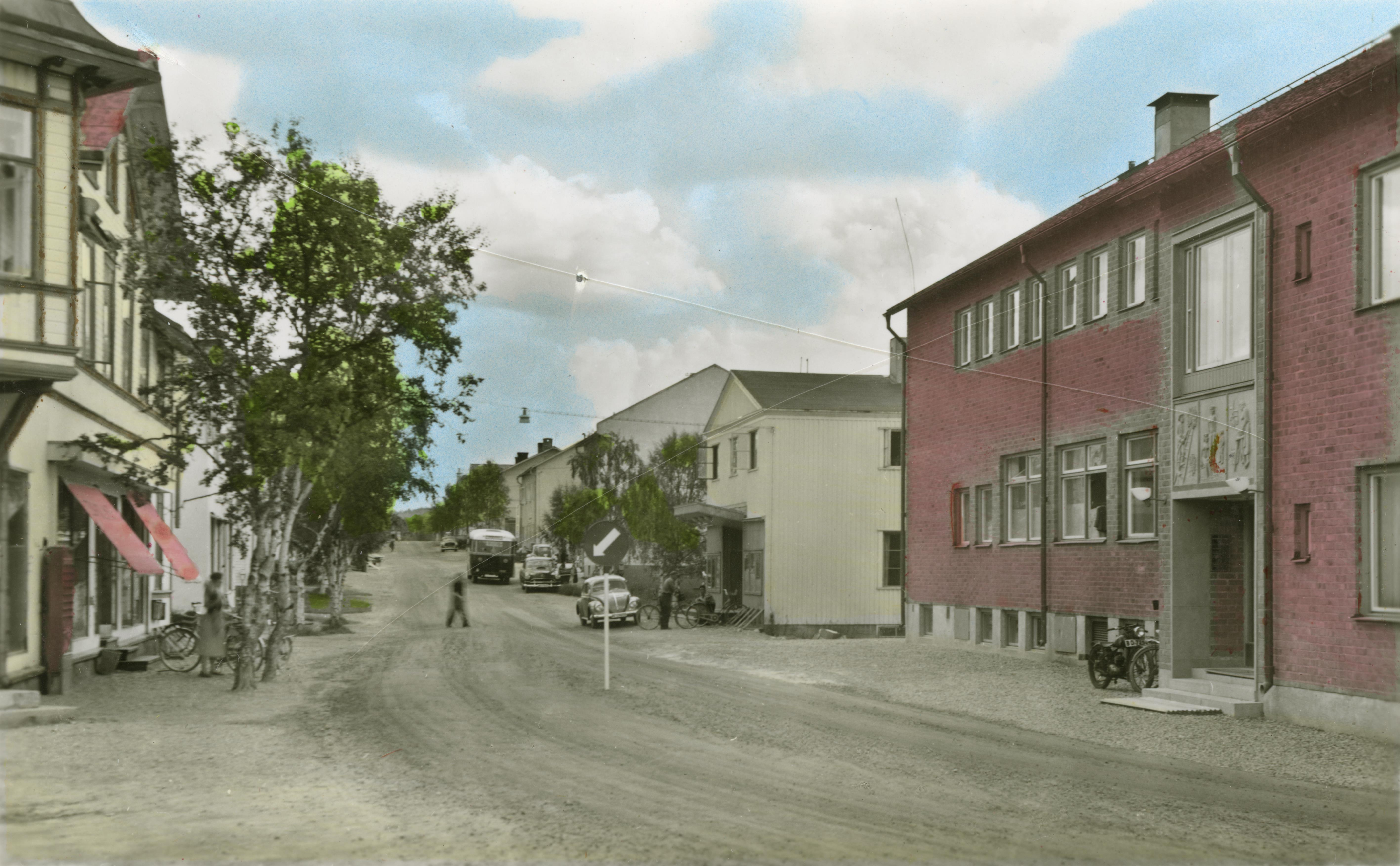 Handkolorerad variant av ac00937. Motiv: Arjeplog Nyckelord: Riksintressen Kategori: Stadsmiljö Handkolorerad variant av ac00937.